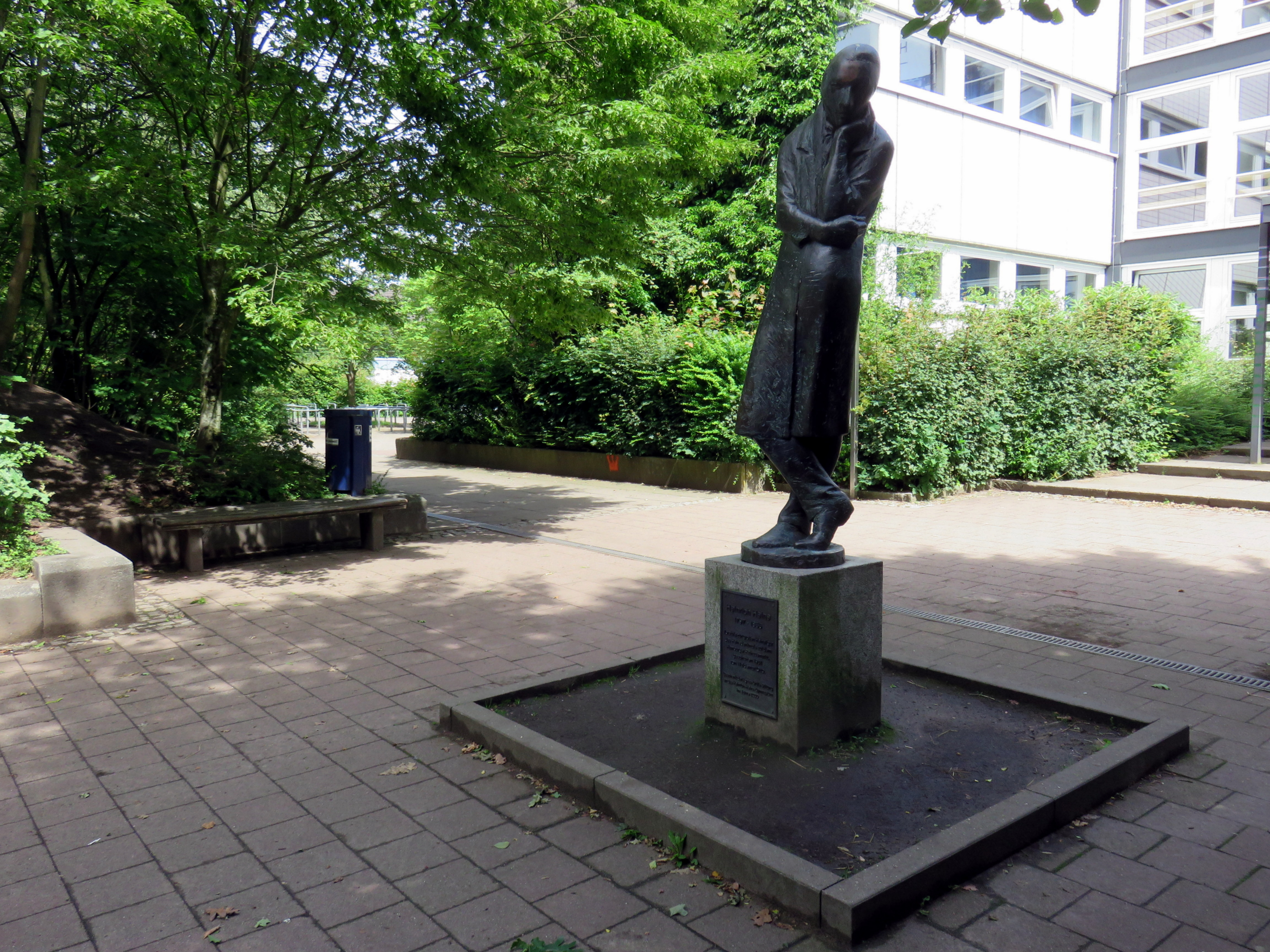 Heine-Denkmal des deutschen Bildhauers Waldemar Otto von 1981, Heinrich-Heine-Gymnasium, Harksheider Straße 70, Hamburg-Poppenbüttel.